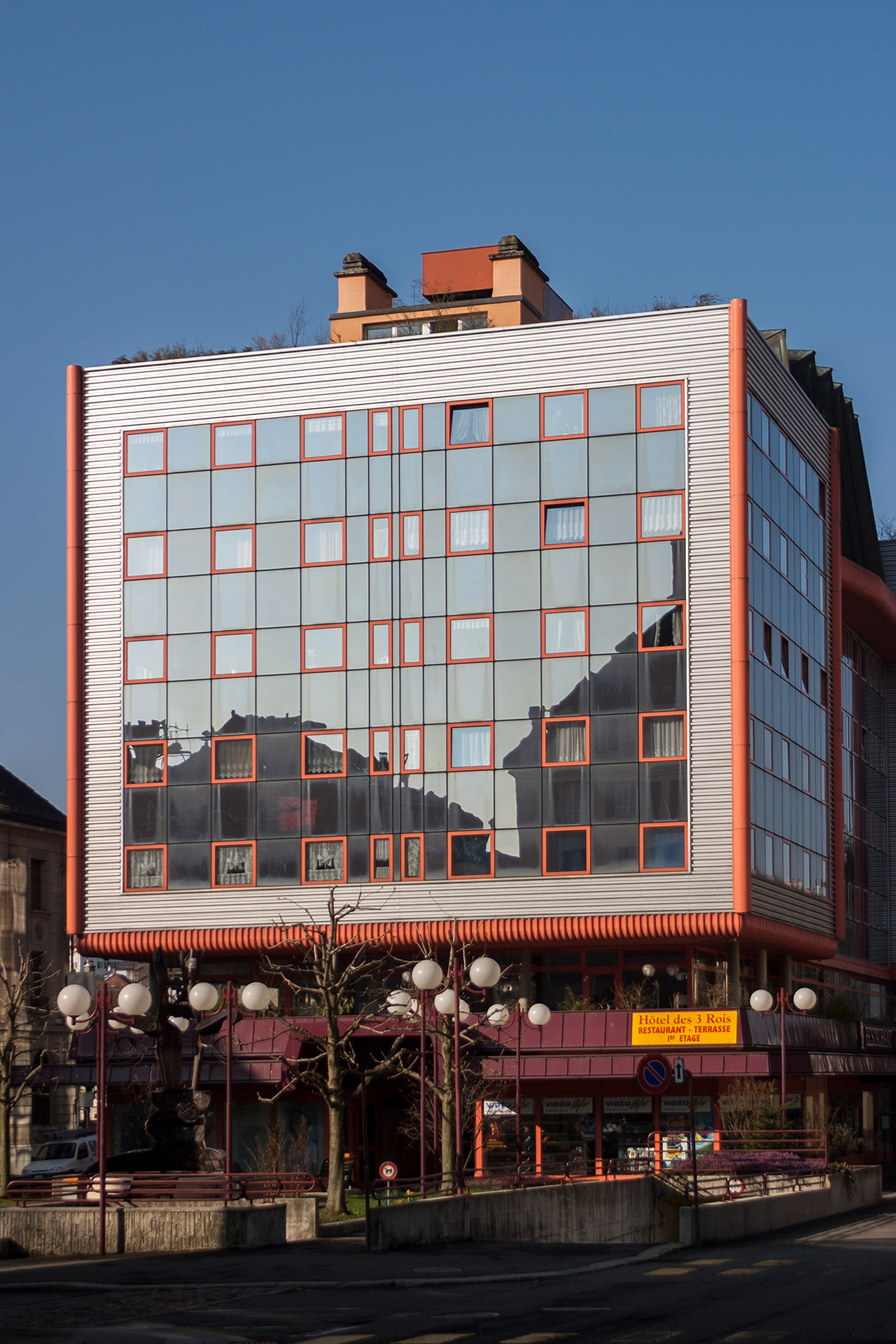 Hotel des Trois Rois in Le Locle (NE)